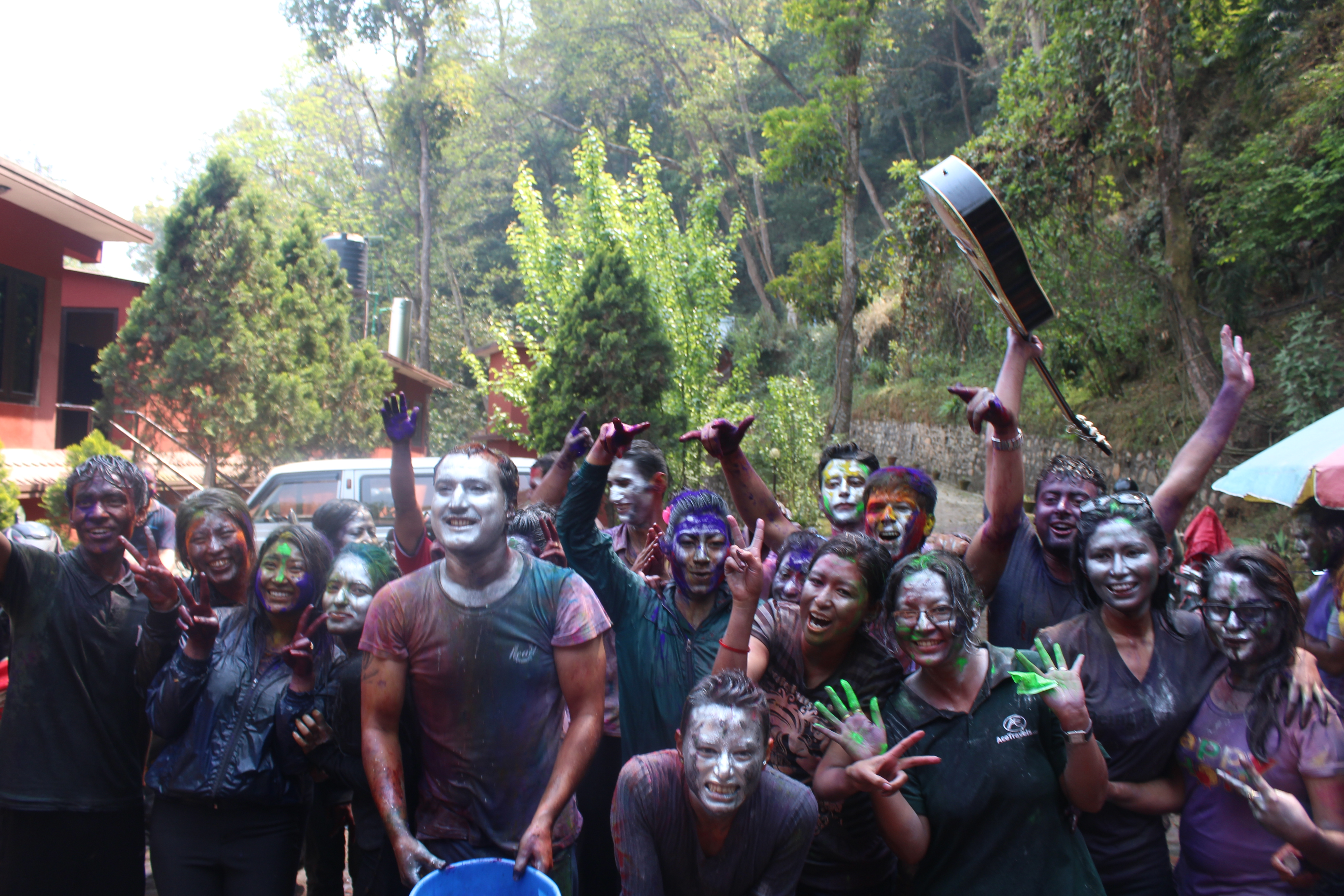 नेपाली: काठमाडौंका सर्बसाधारण होलीमा रमाउदै